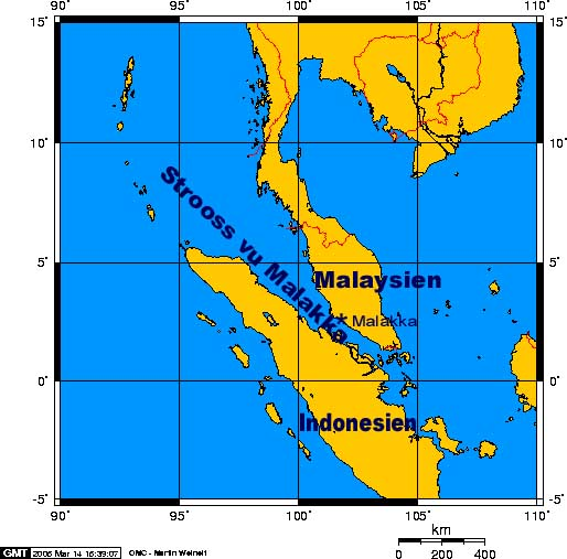 Kaart mat der Strooss vu Malakka